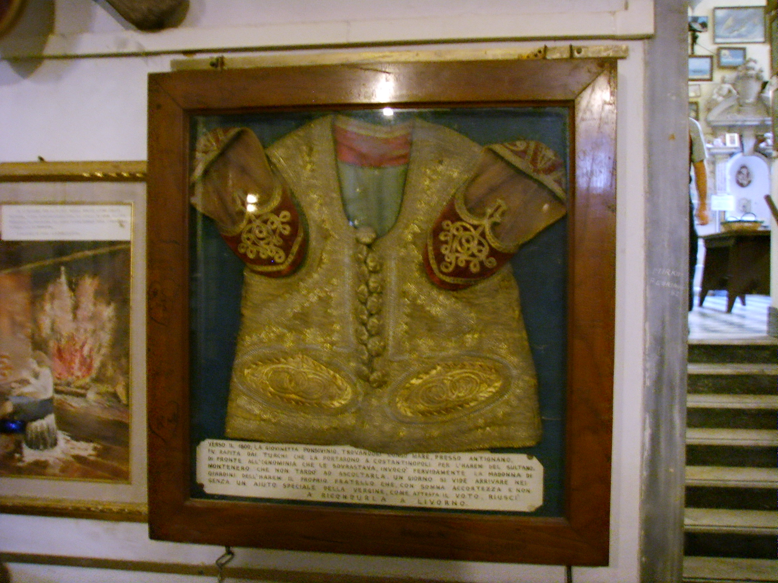 Santuario di montenero, ex-voto di un'italiana rapita a costantinopoli e liberata nell'harem